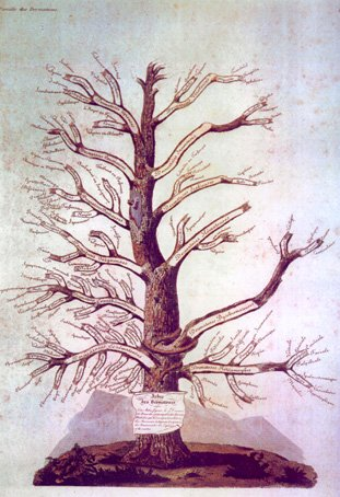 Arbres des dermatoses d'Alibert